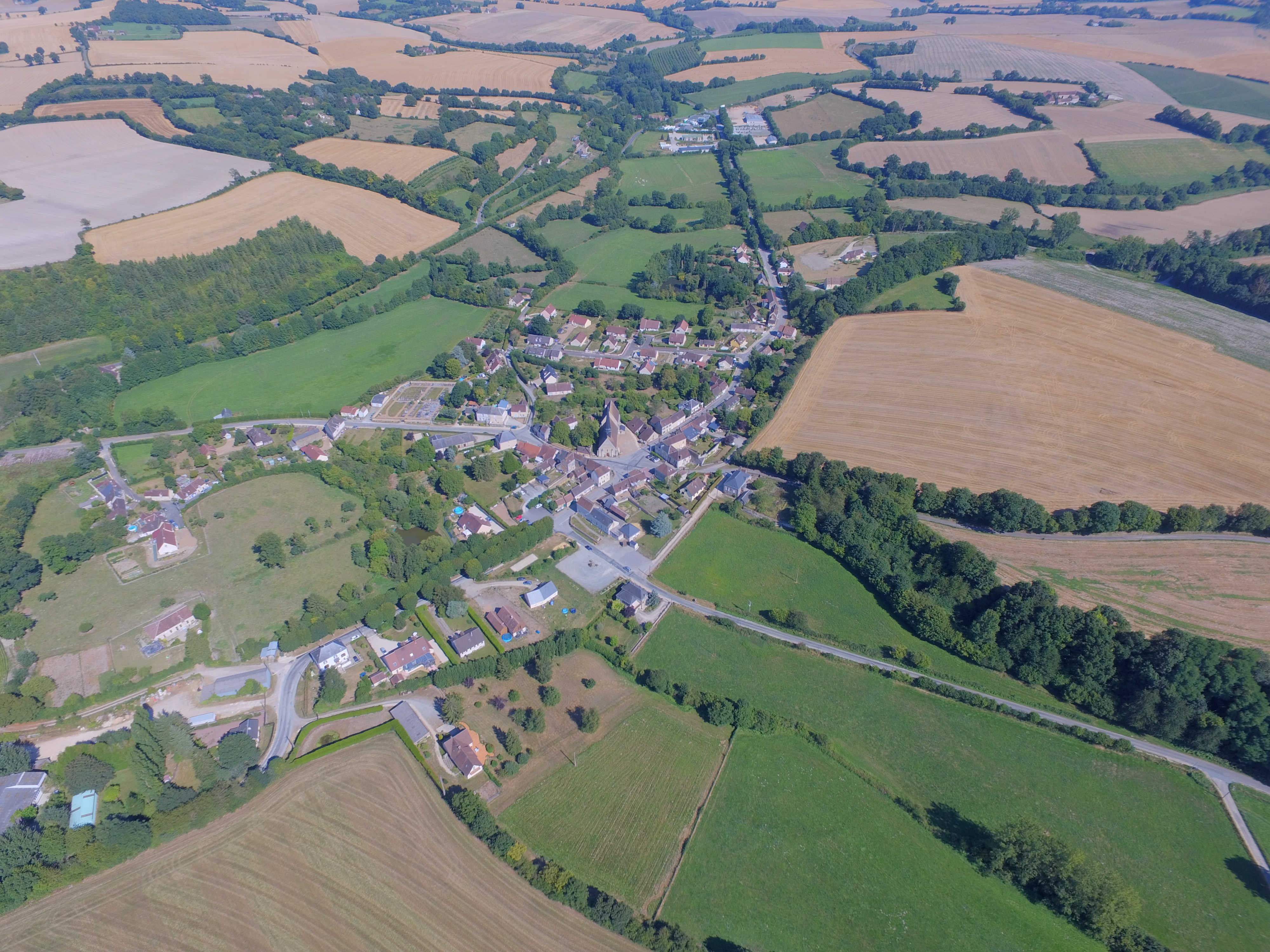 prise de vue aérienne de Coudray-au-Perche, Eure-et-Loir, France (été 2016).